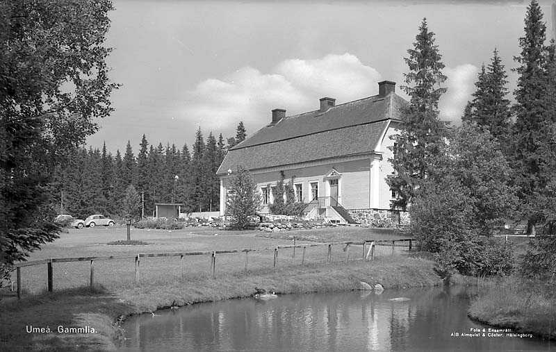 Sävargården, Gammlia.; Bruksherrgård; Byggnadsverk; Slott och herrgårdar